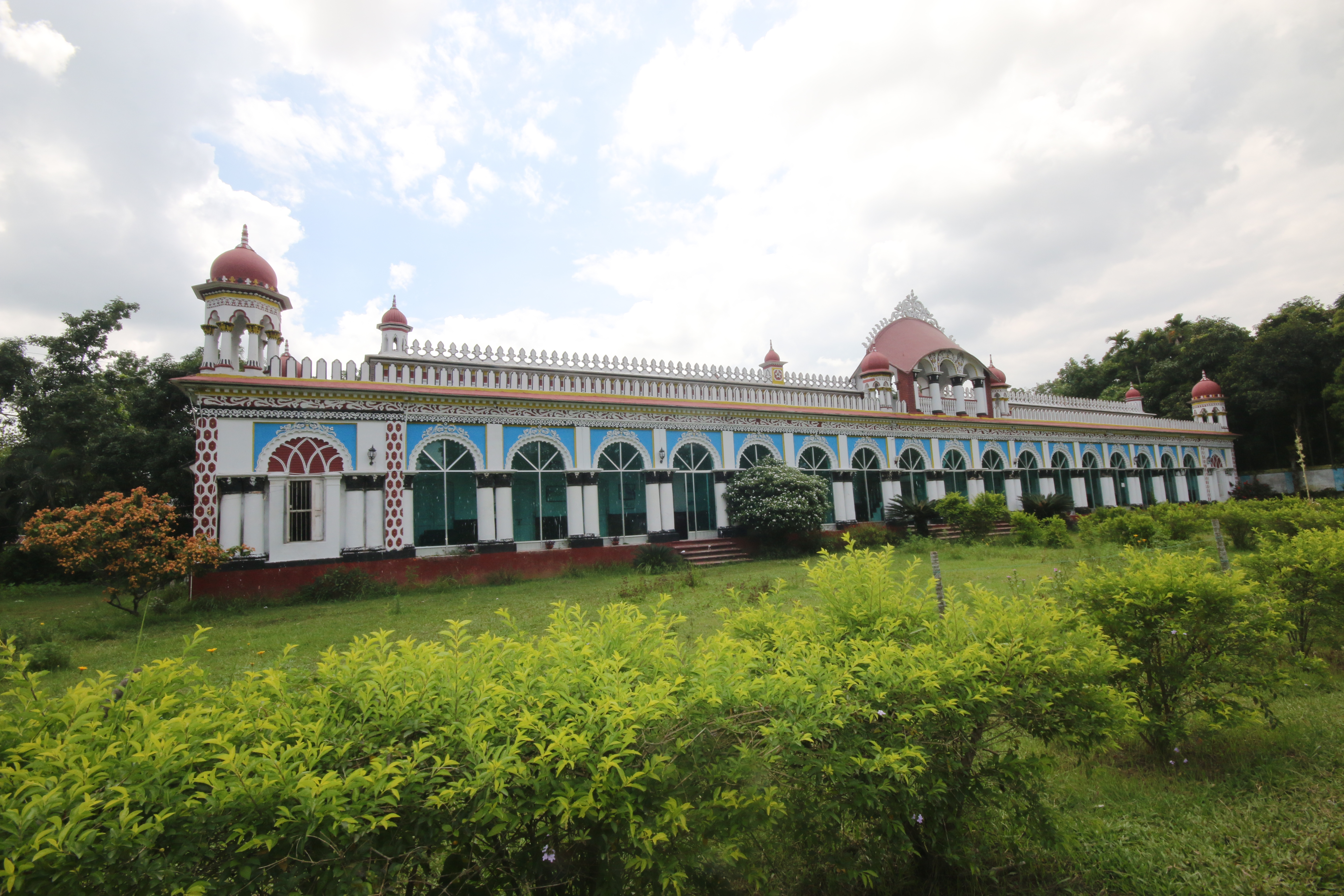 ধনবাড়ী জমিদার বাড়ি